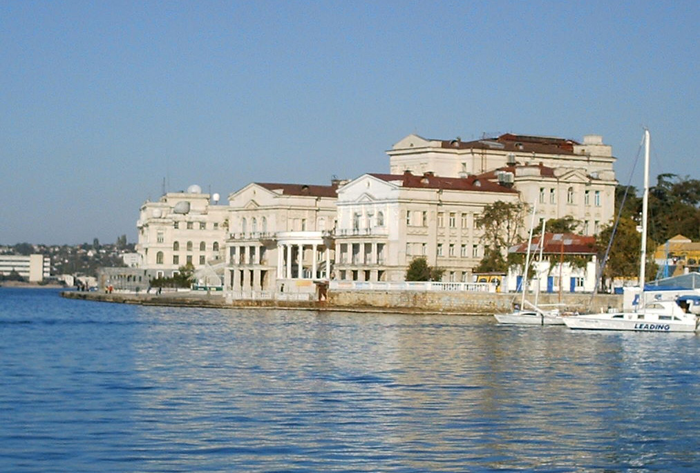 Дворец пионеров в Севастополе